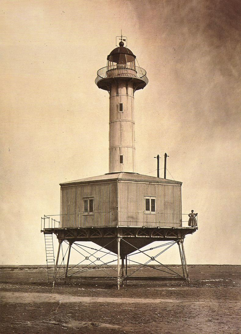 Far de la Banya, fotografiat vers 1865.